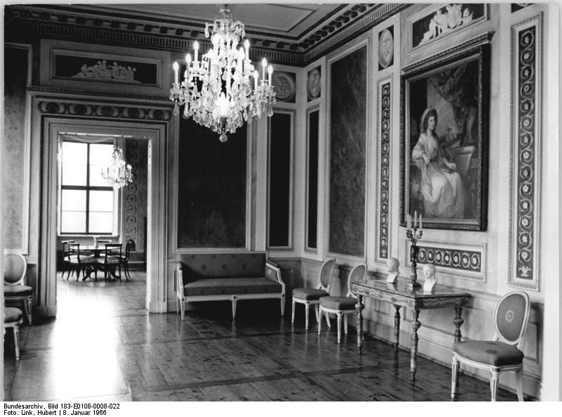 Weimar, Römisches Haus, Blaues Zimmer Zentralbild Link 8.1.1966 Weimar - die Stadt deutscher Klassik. Die kleine Stadt Weimar in Thüringen, dem grünen Herzen Deutschlands, zählt zu den berühmtesten Städten Deutschlands. Vor allem wurde sie berühmt durch das Wirken von Lucas Cranach, Johann Sebastian Bach, durch die Klassiker der deutschen Literatur Wieland, Herder, Schiller und Goethe und durch das Wirken des ungarischen Komponisten und Pianisten Franz Liszt. UBz: Das blaue Zimmer des Römischen Hauses in Weimar. Das Römische Haus diente in den Jahren von 1791-1797 Herzog Carl August als Sommerwohnung. Goethe hat sich maßgeblich an der Ausgestaltung dieses Hauses beteiligt.